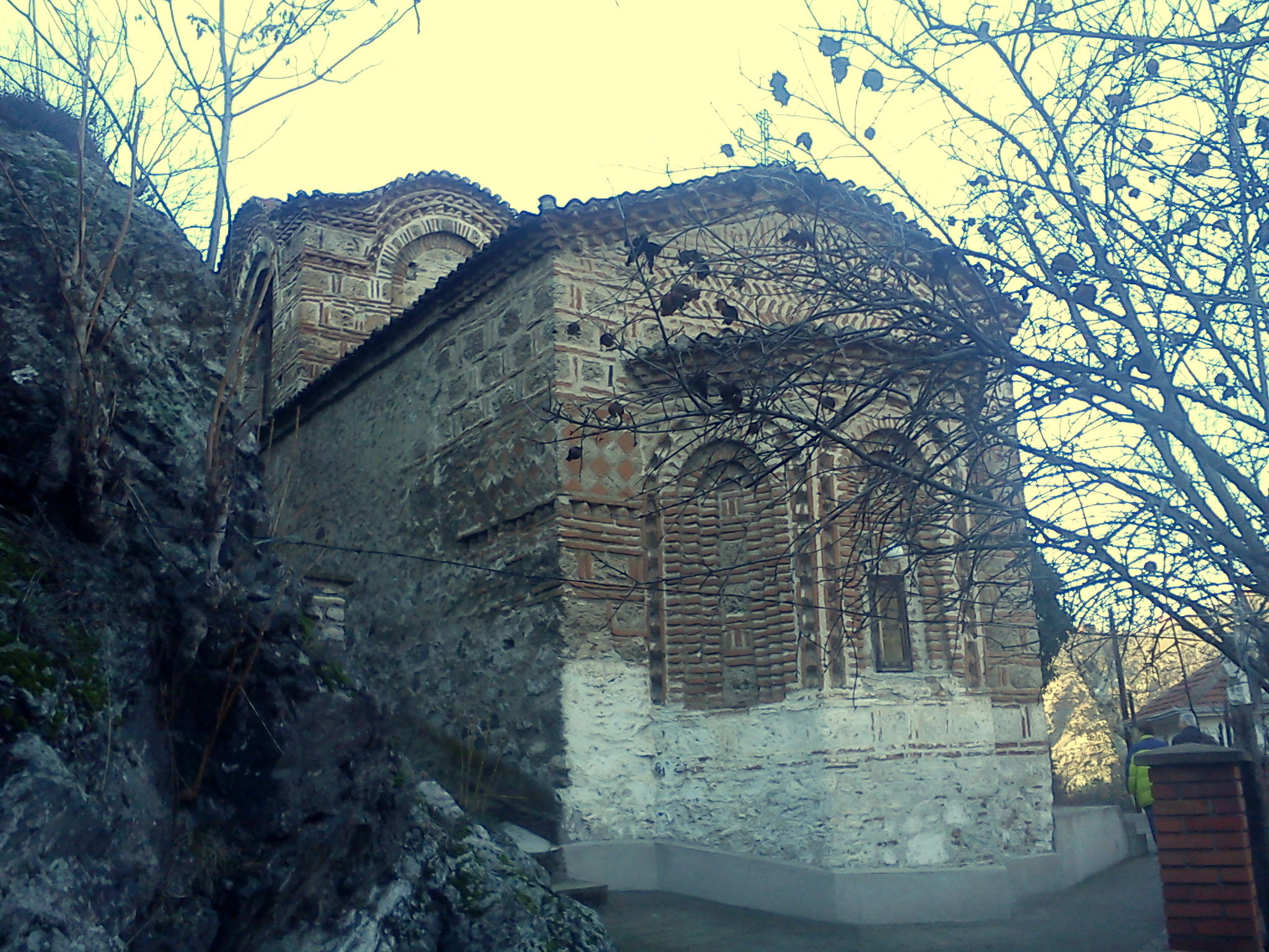 Манастирот Св. Димитрија во Велес